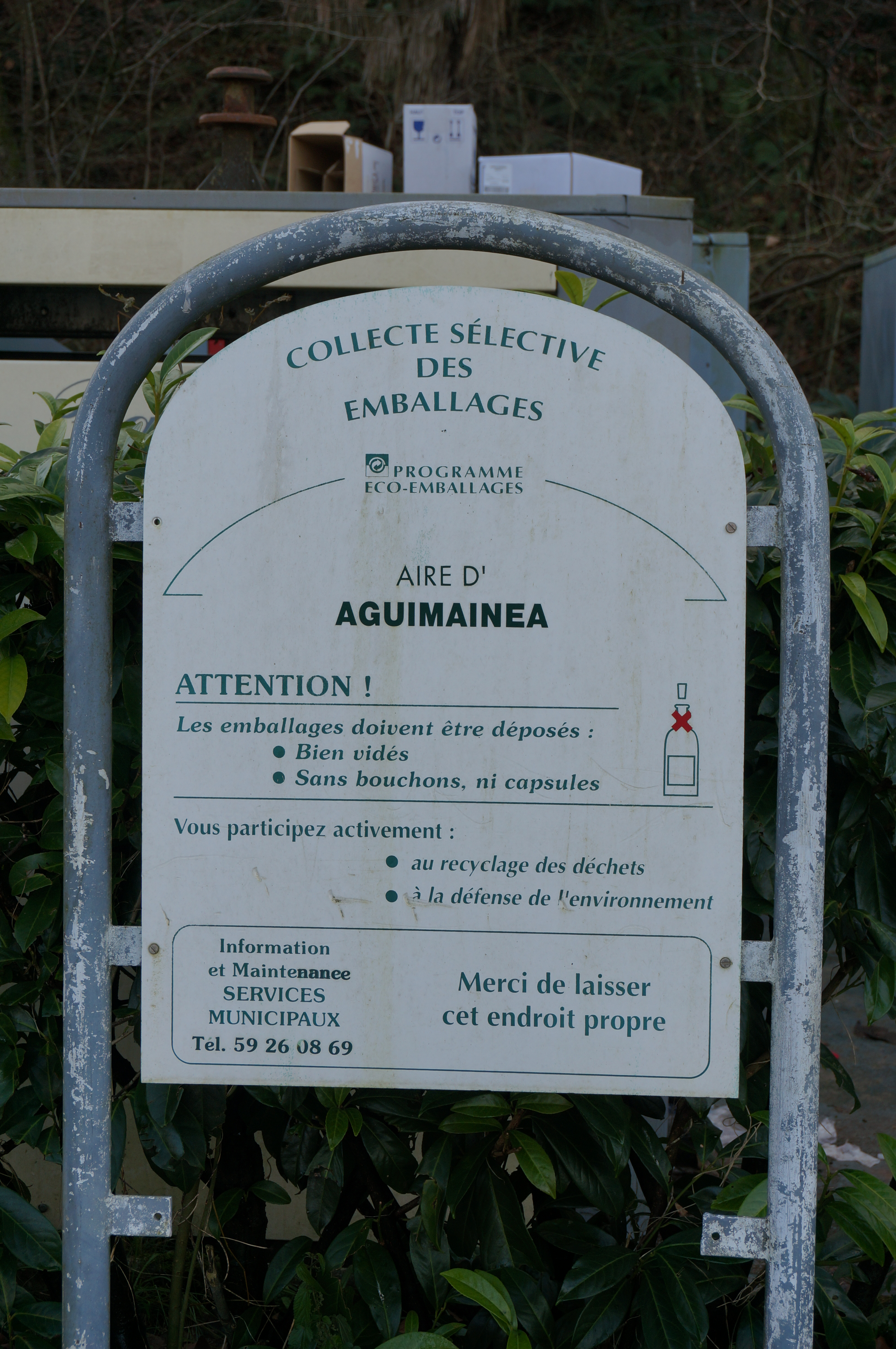 Panneau de collecte des emballages à Sare